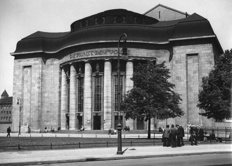 Berlin Die Volksbühne am Horst Wessel Platz